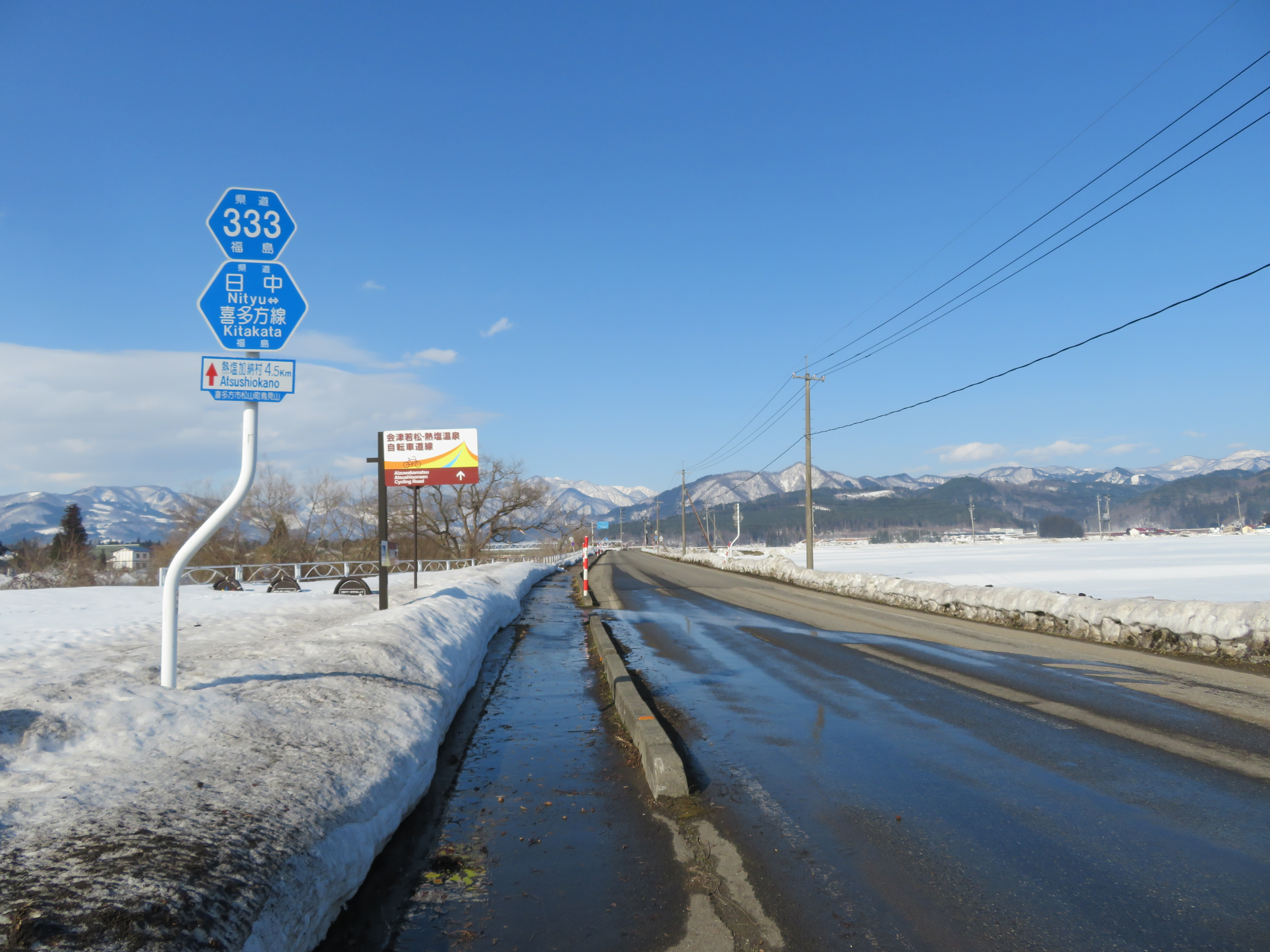 福島県道333号線喜多方市松山町鳥見山付近